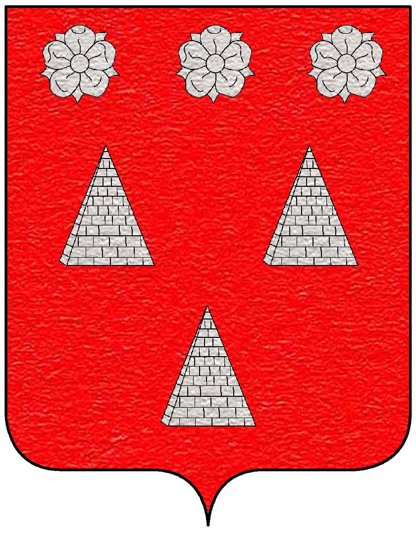 Stemma della famiglia Di Mareri